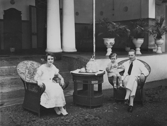 foto. Portret van een theedrinkende Europese familie voor hun huis in Cheribon, met een theemuts in de vorm van een pop